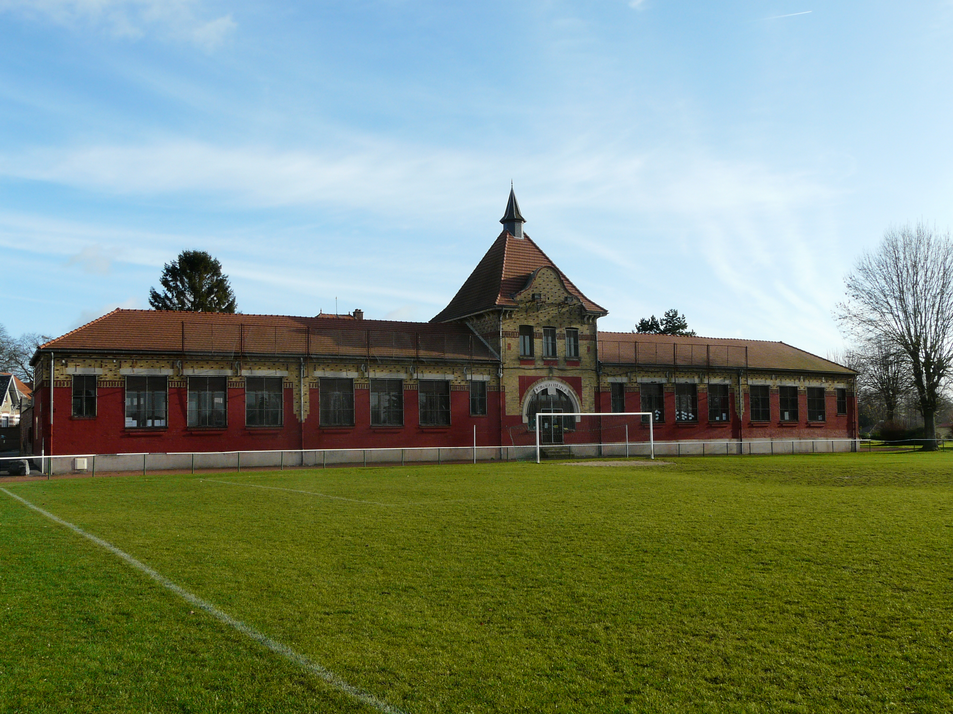 L'école Hostetter à Masnières, nommée en hommage au lieutenant Theodore Hostetter (1897-1918)